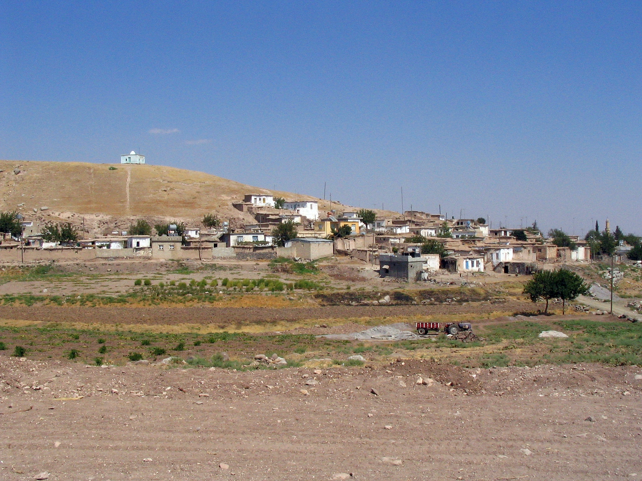 Siedlungshügel Oylum Höyük, Südosttürkei